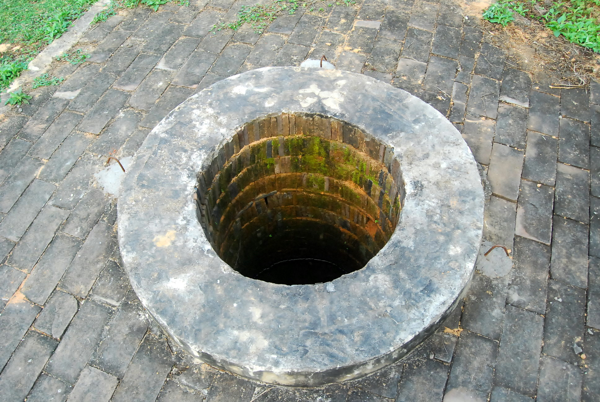 宋氏祖居中的水井